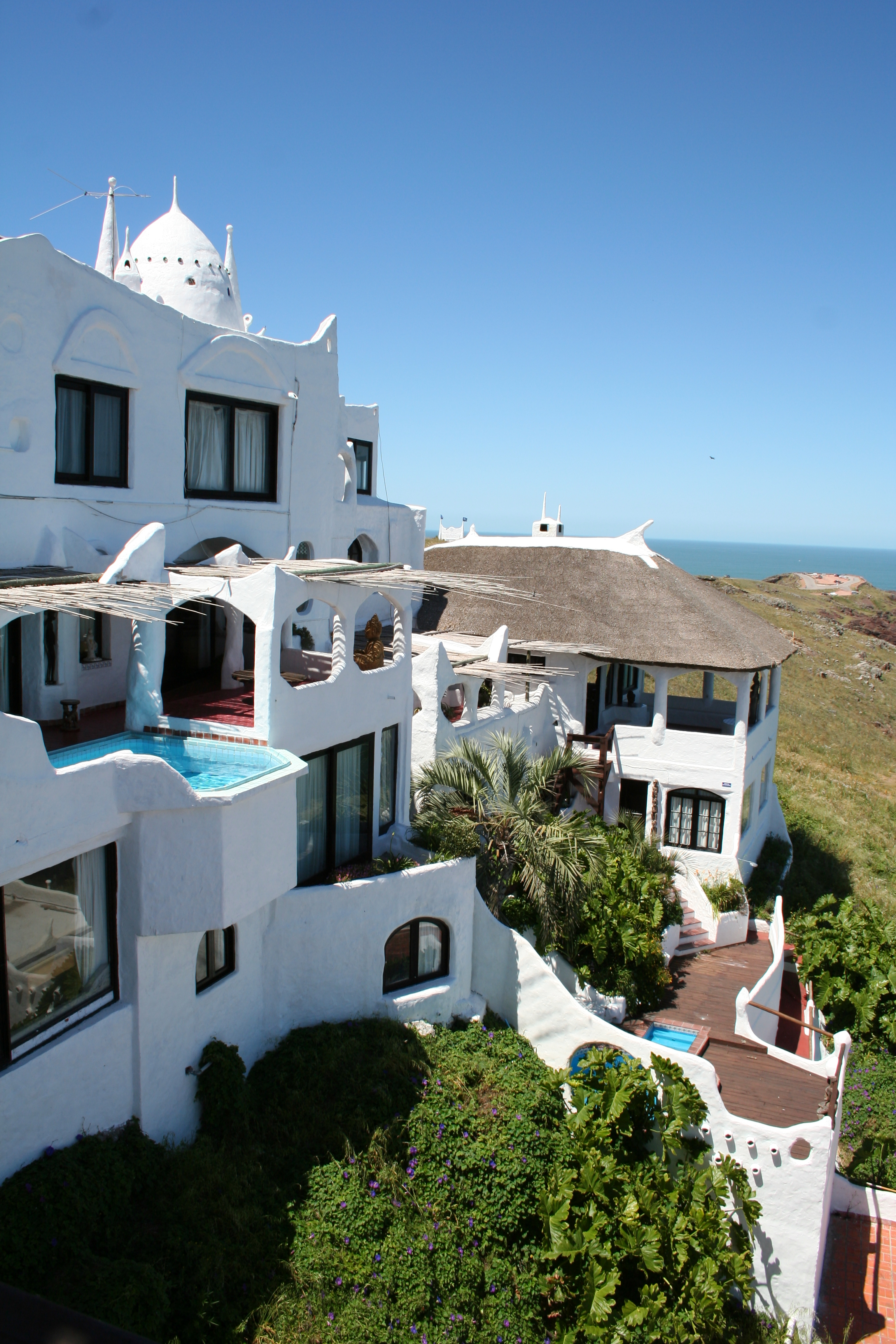 Casapueblo26